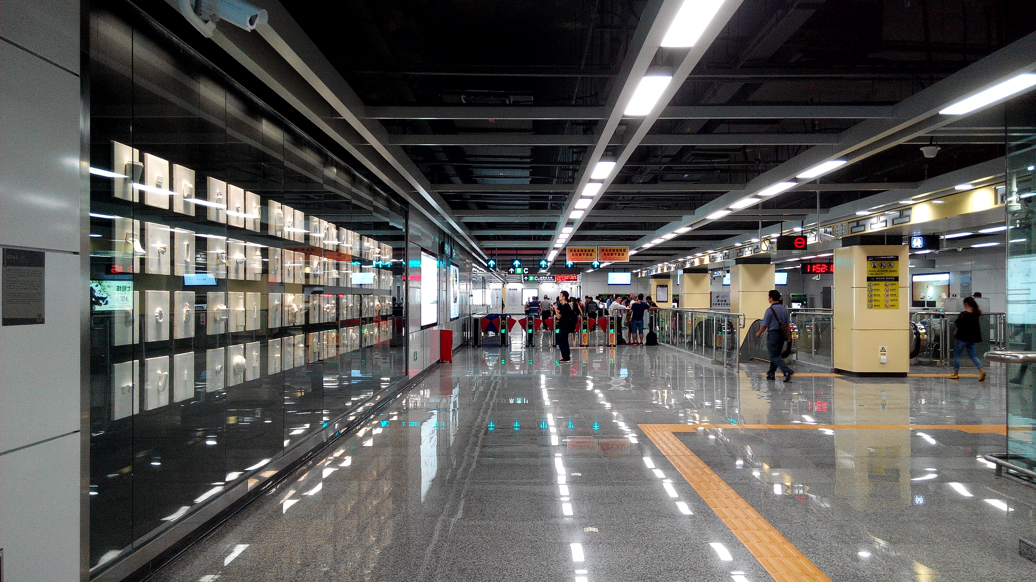 深圳地铁9号线 泥岗站大堂